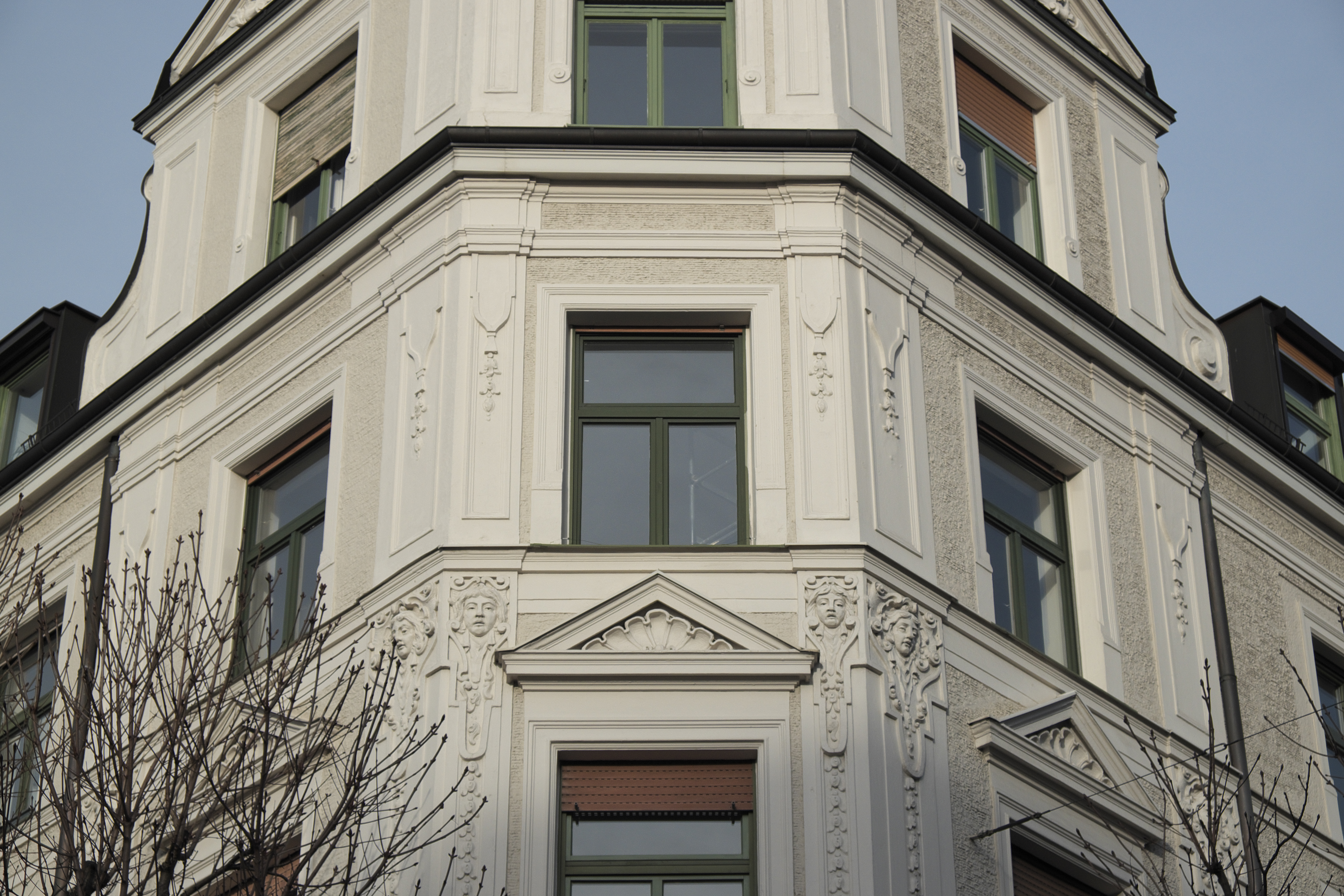 Mietshaus in der Volkartstraße 32 in Neuhausen im Stadtbezirk Neuhausen-Nymphenburg in München (Bayern/Deutschland), um 1900